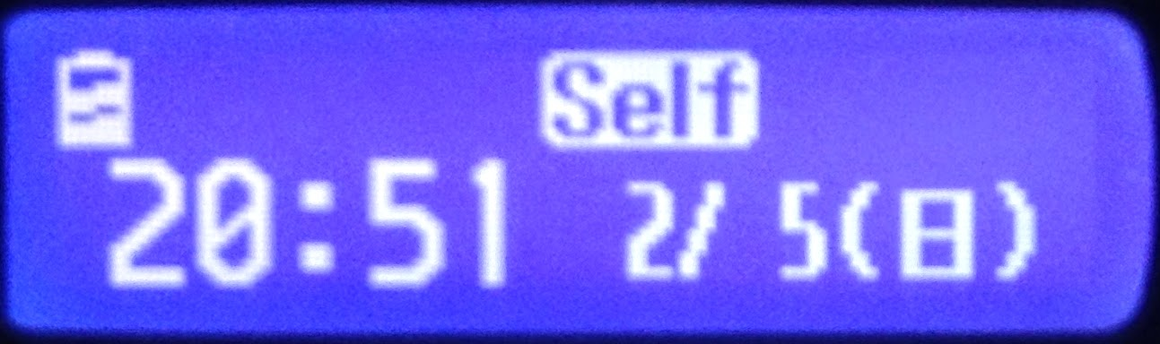 N2051に搭載された「イルミネーション・ウィンドウ」(表示内容・フォントはP2102Vに搭載された「プライベート・ウィンドウ」と同一)